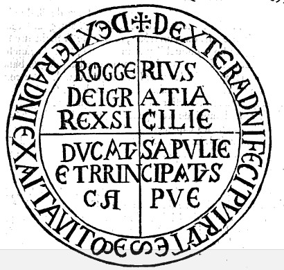 Roger II. Sicilský